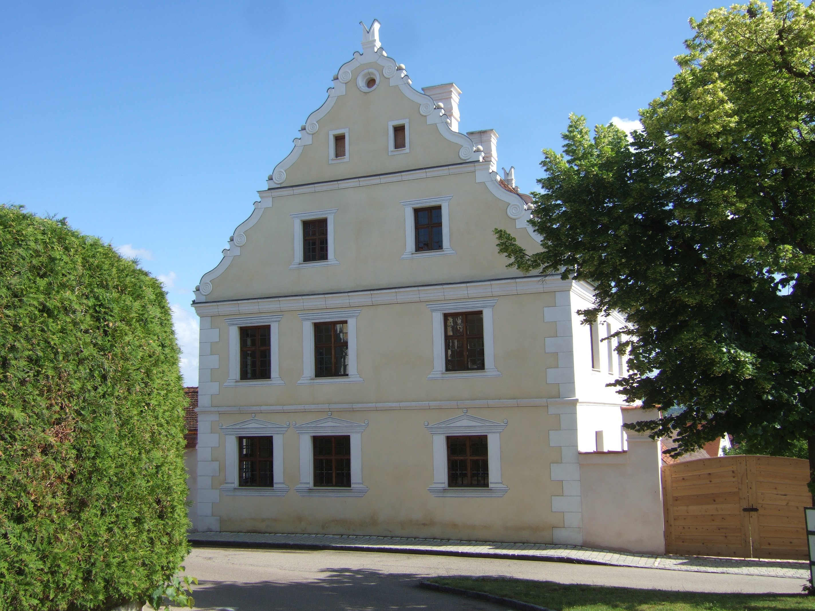 Von Jan Haus Wallerstein